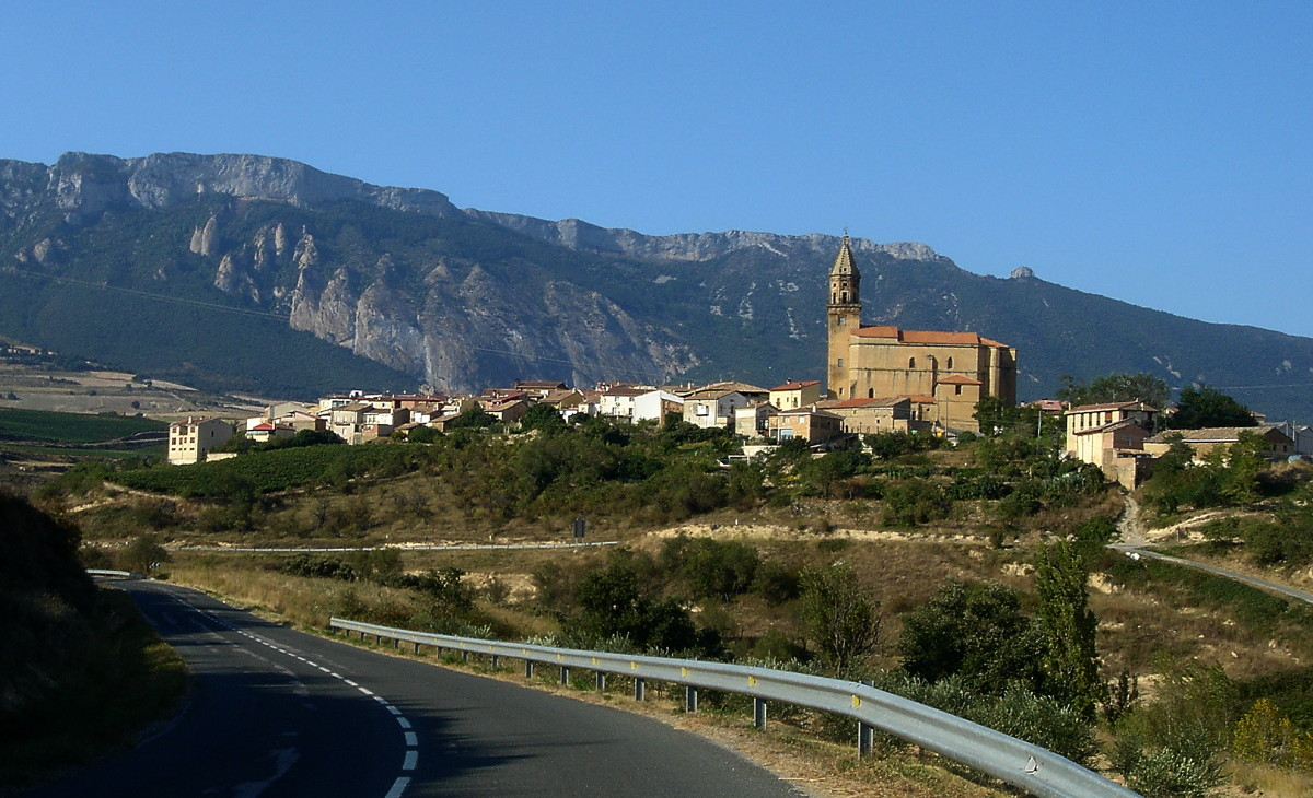 Bilar (Arabako errioxa, Araba)